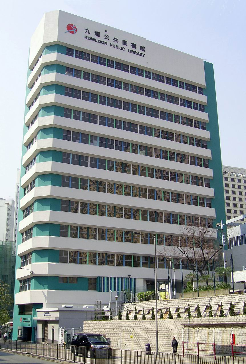 九龍公共圖書館